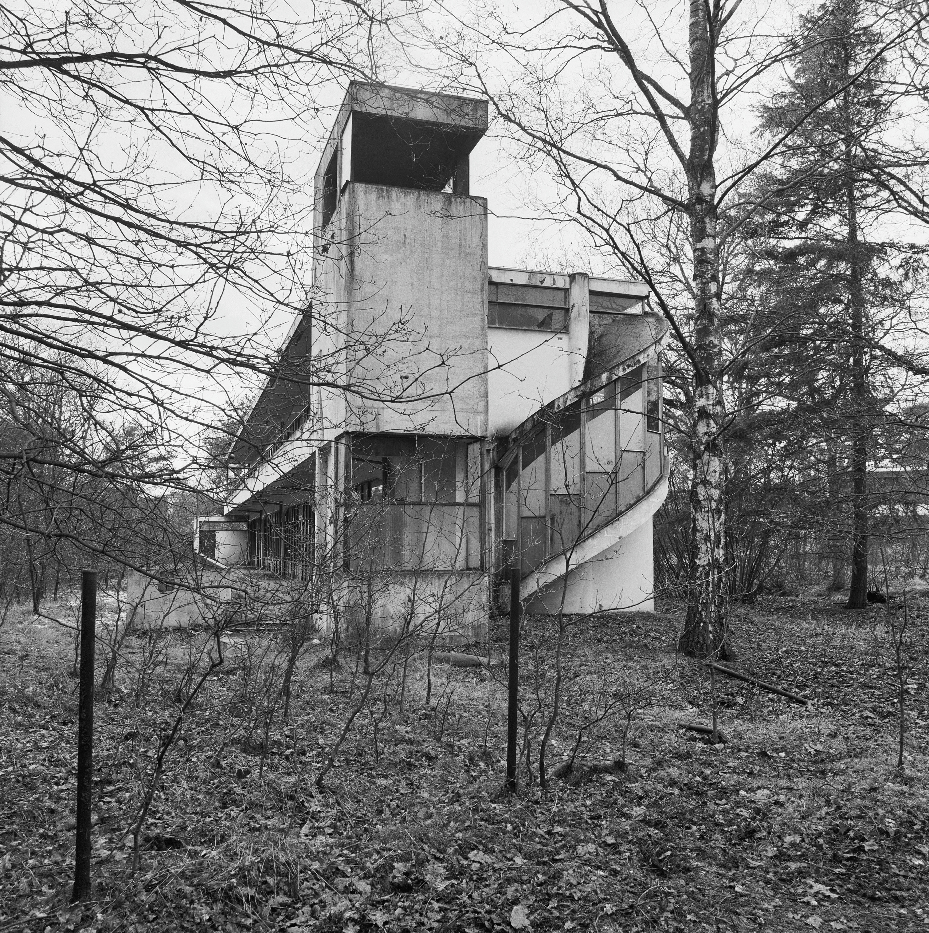 Sanatorium Zonnestraal: exterieur